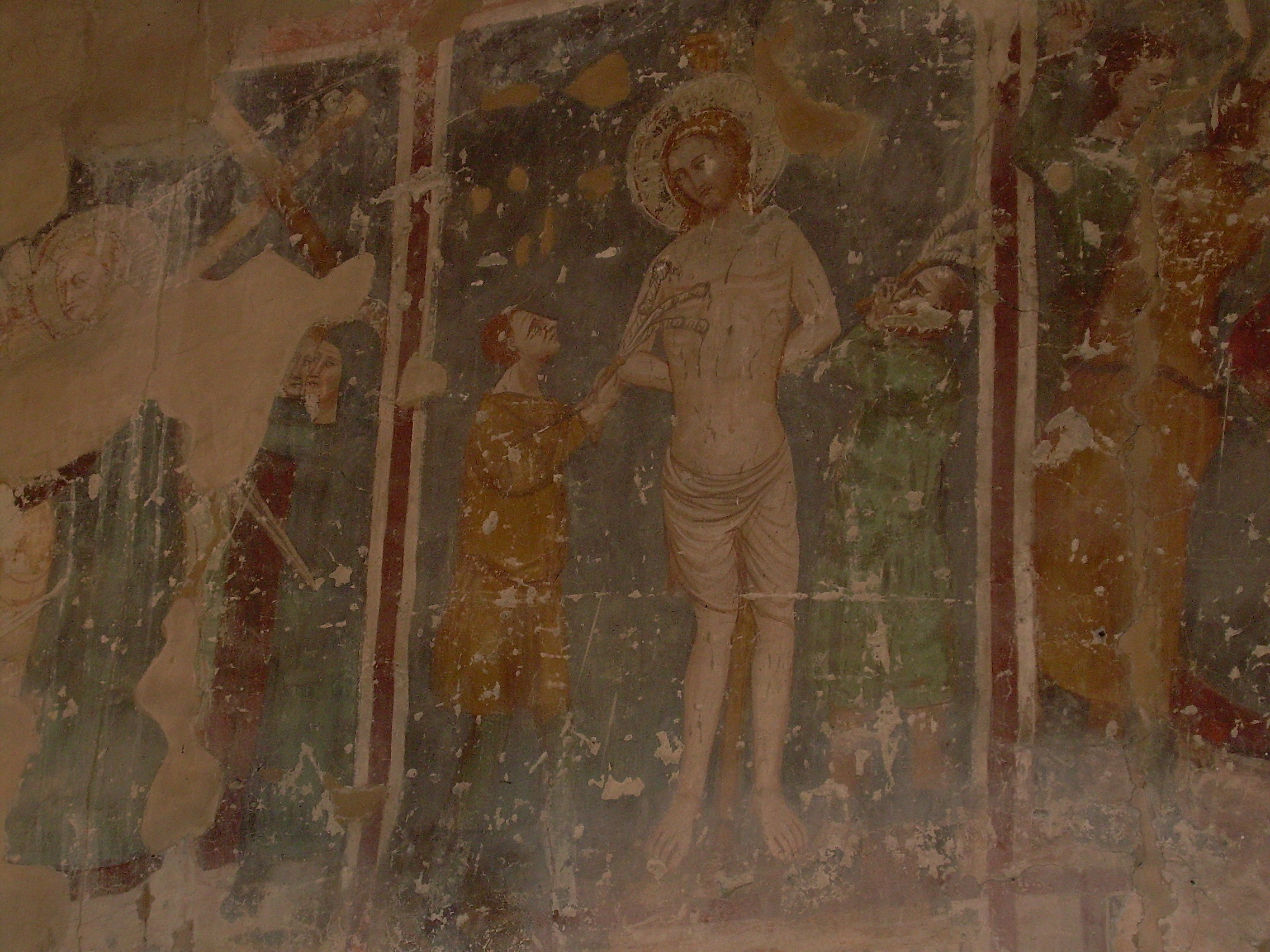 Anonimo locale popolaresco del XIV sec. appartenente al ciclo cristologico dell' oratorio attiguo alla chiesa di S. Maria alla Colombata